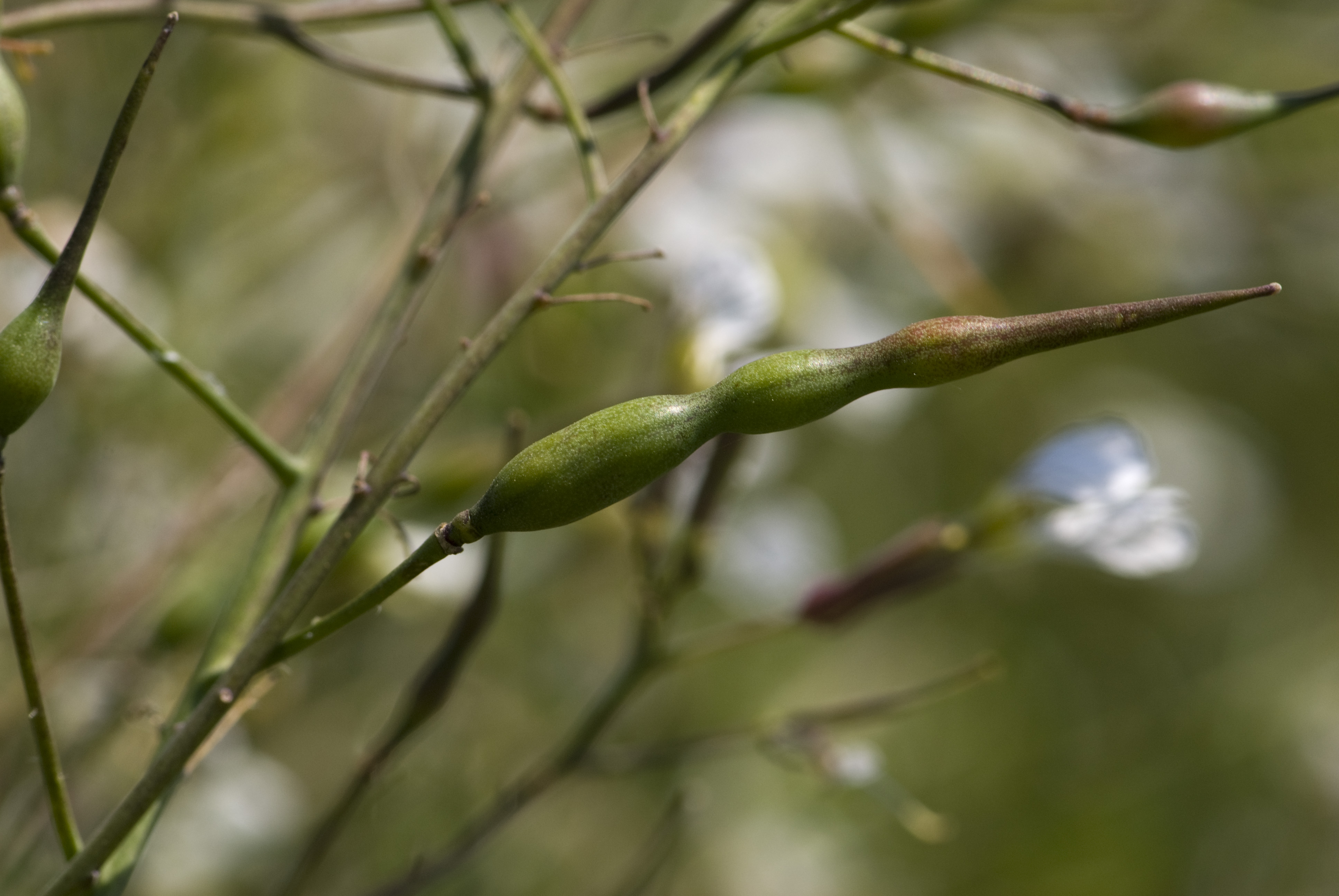 Raphanus raphanistrum-var-raphanistrum Velennes (Somme), France